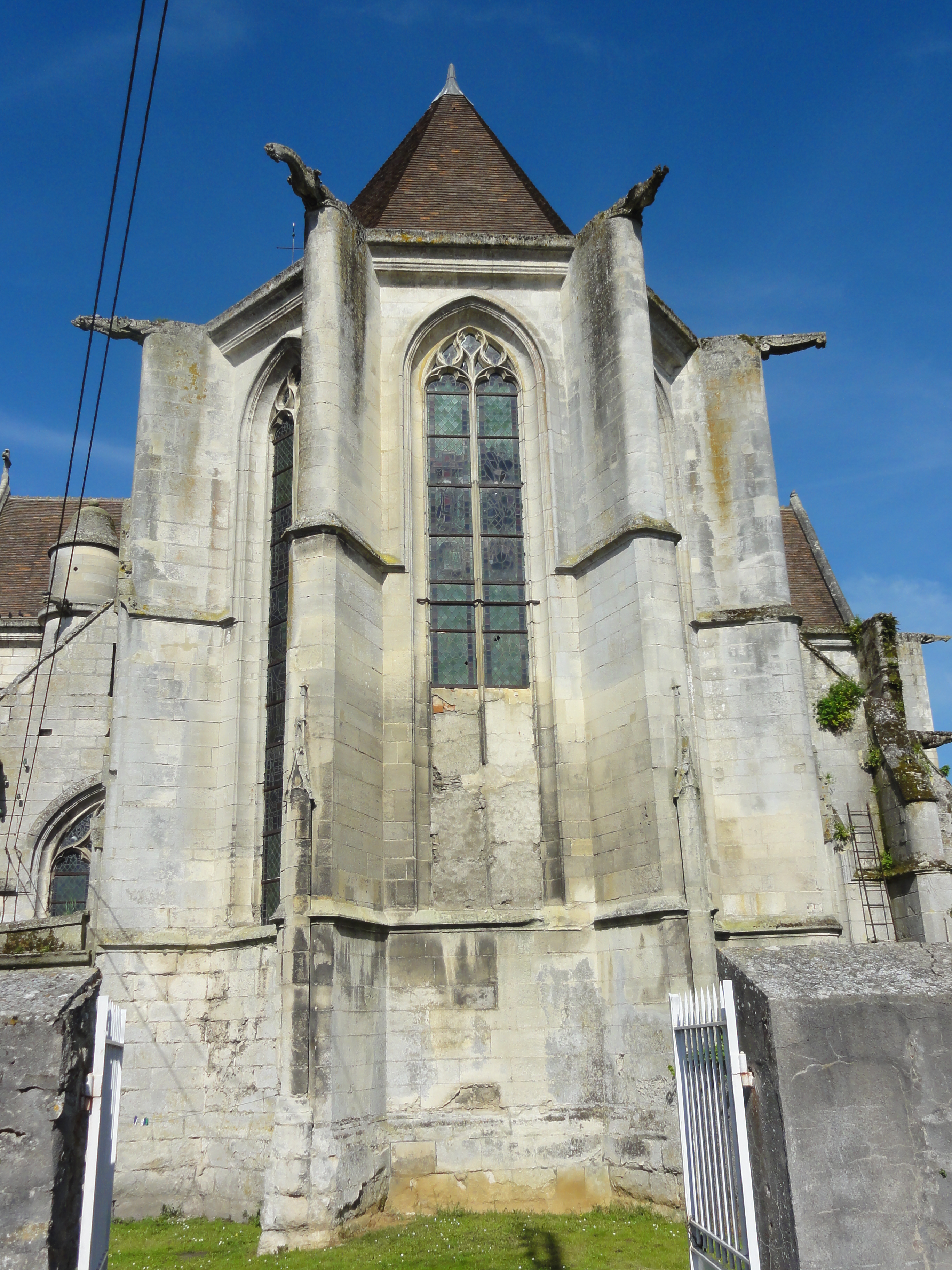 Église Saint-Pierre-et-Saint-Paul de Baron (voir titre).